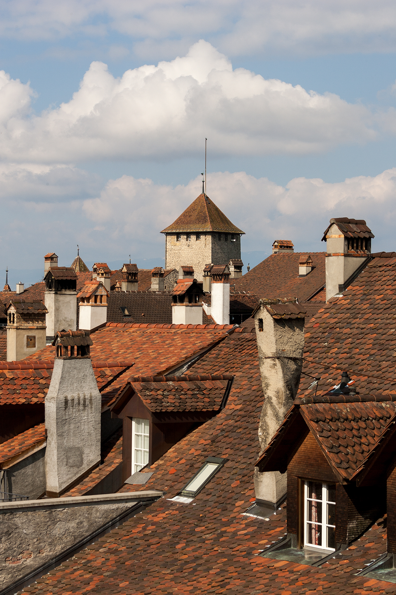 Dachlandschaft der Altstadt von Murten (FR)